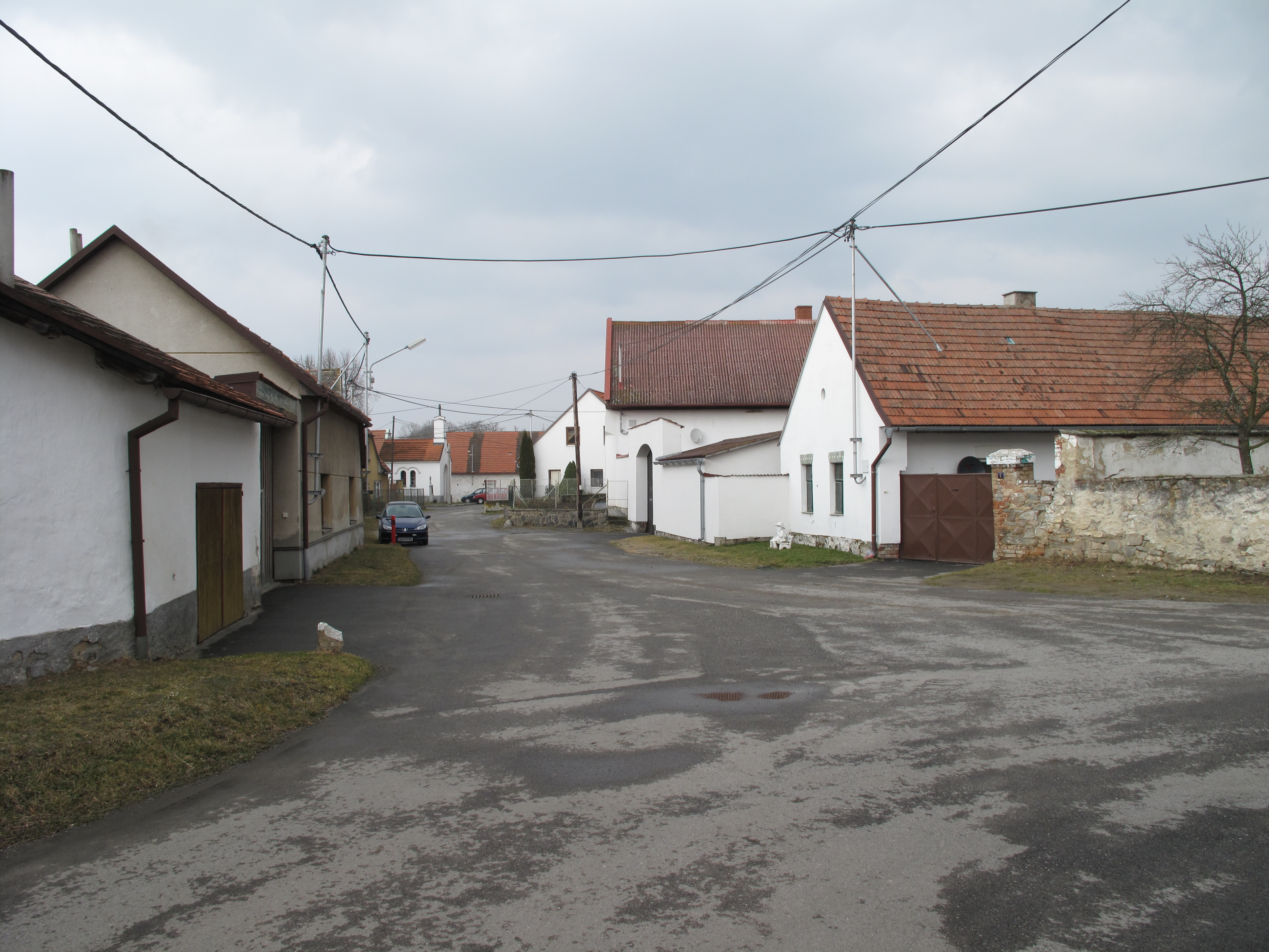 Náves v Úlehlích. Okres Strakonice, Česká republika.